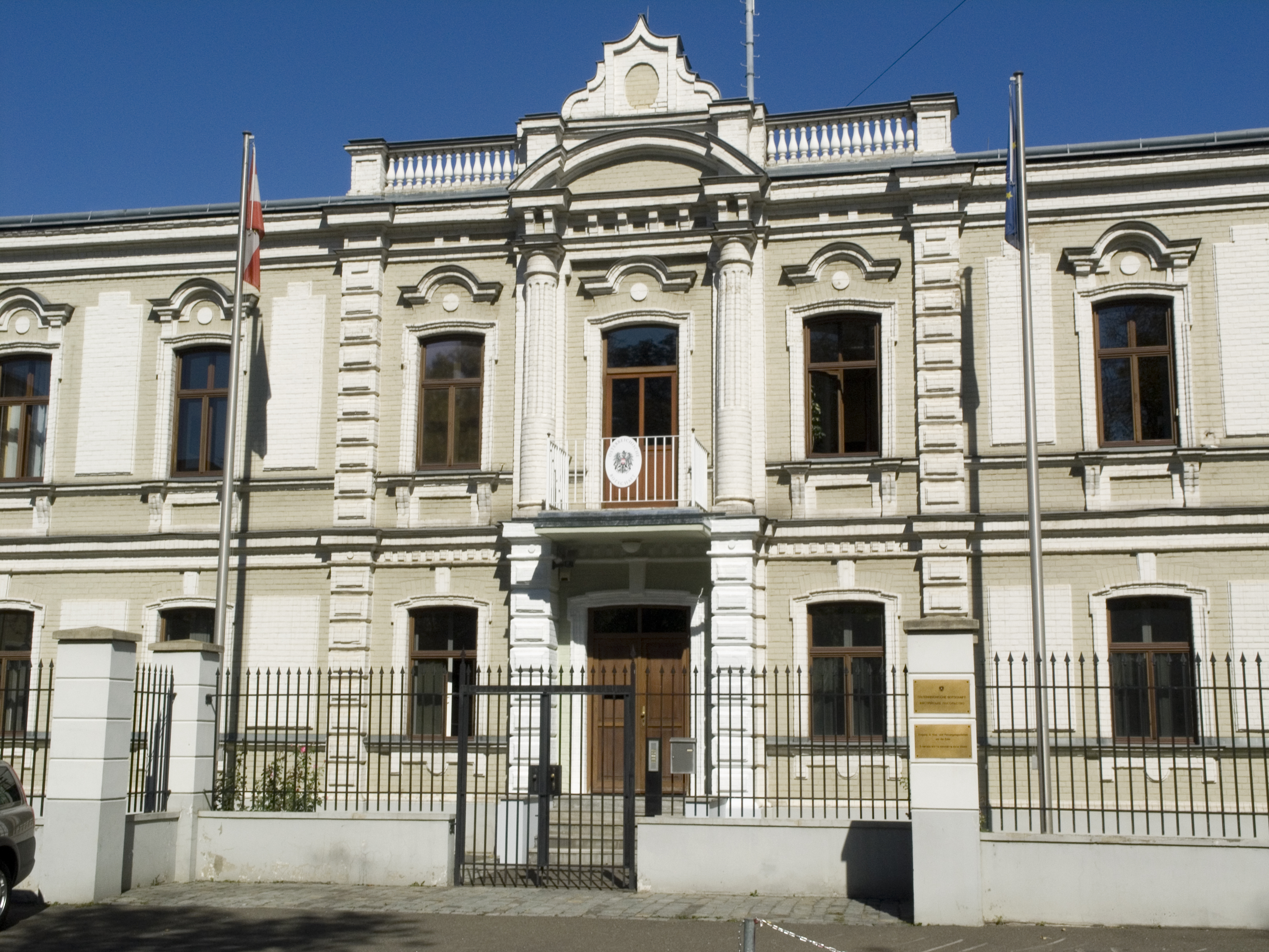 Україна, Київ - вул. Івана Франко, 33 - Особняк, в якому у 1918-19 рр. і у 1923 р. жив Паустовський К. Г., письменник